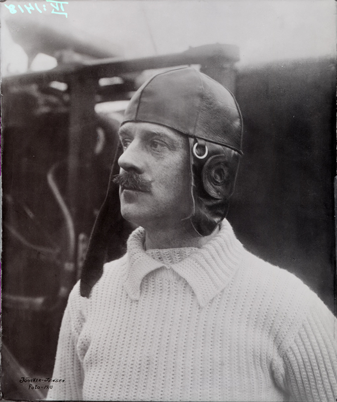 Depicted person: Carl Cederström, Flygpionjär, Friherre, Sverige (1867-1918); Flygarbaronen (även kallad)